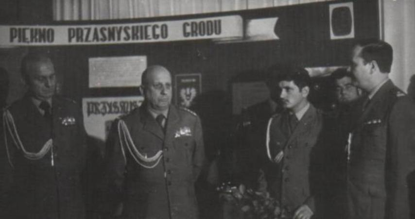 Garnizon Przasnysz, 1968r. Pożegnanie dowódcy JW 4420 płk Zbigniewa Mroza